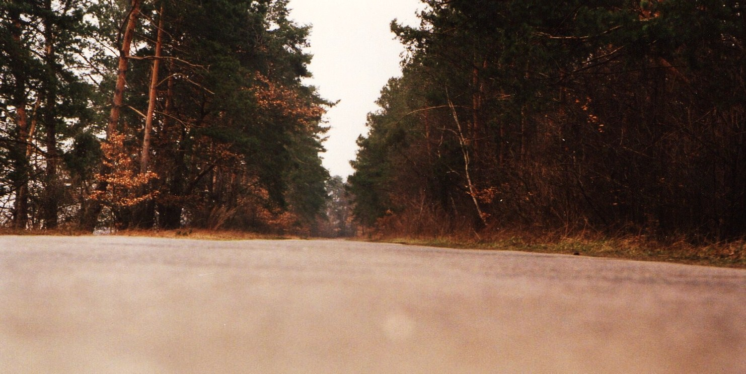 Droga zwana Grajzerówką koło Szreniawy.